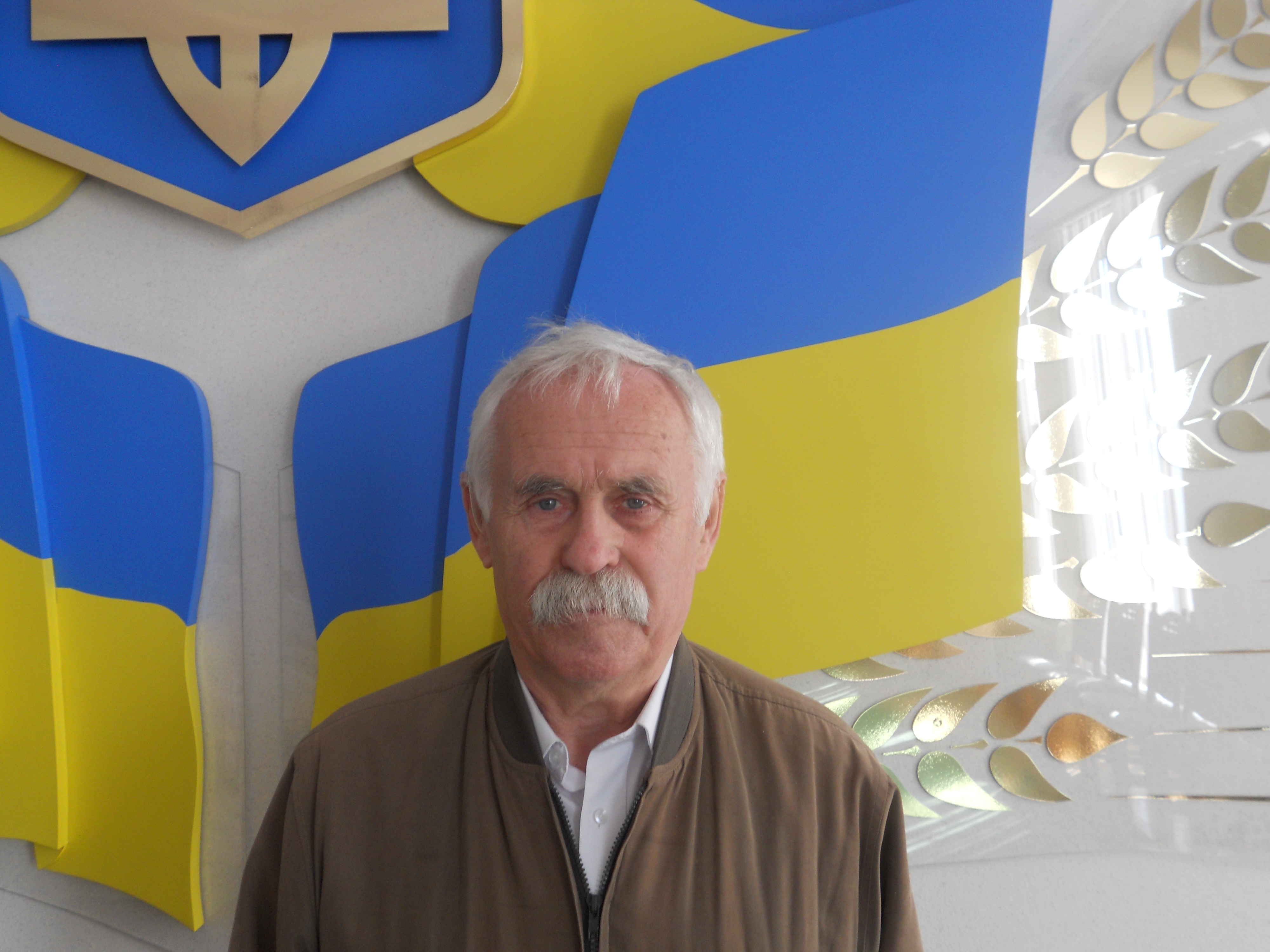 У Чернігові за підтримки USAID пройшла зустріч-обговорення змін до Конституції України.